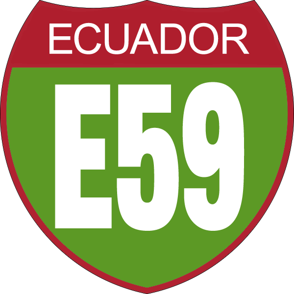 Disco de Identificación Ruta E59